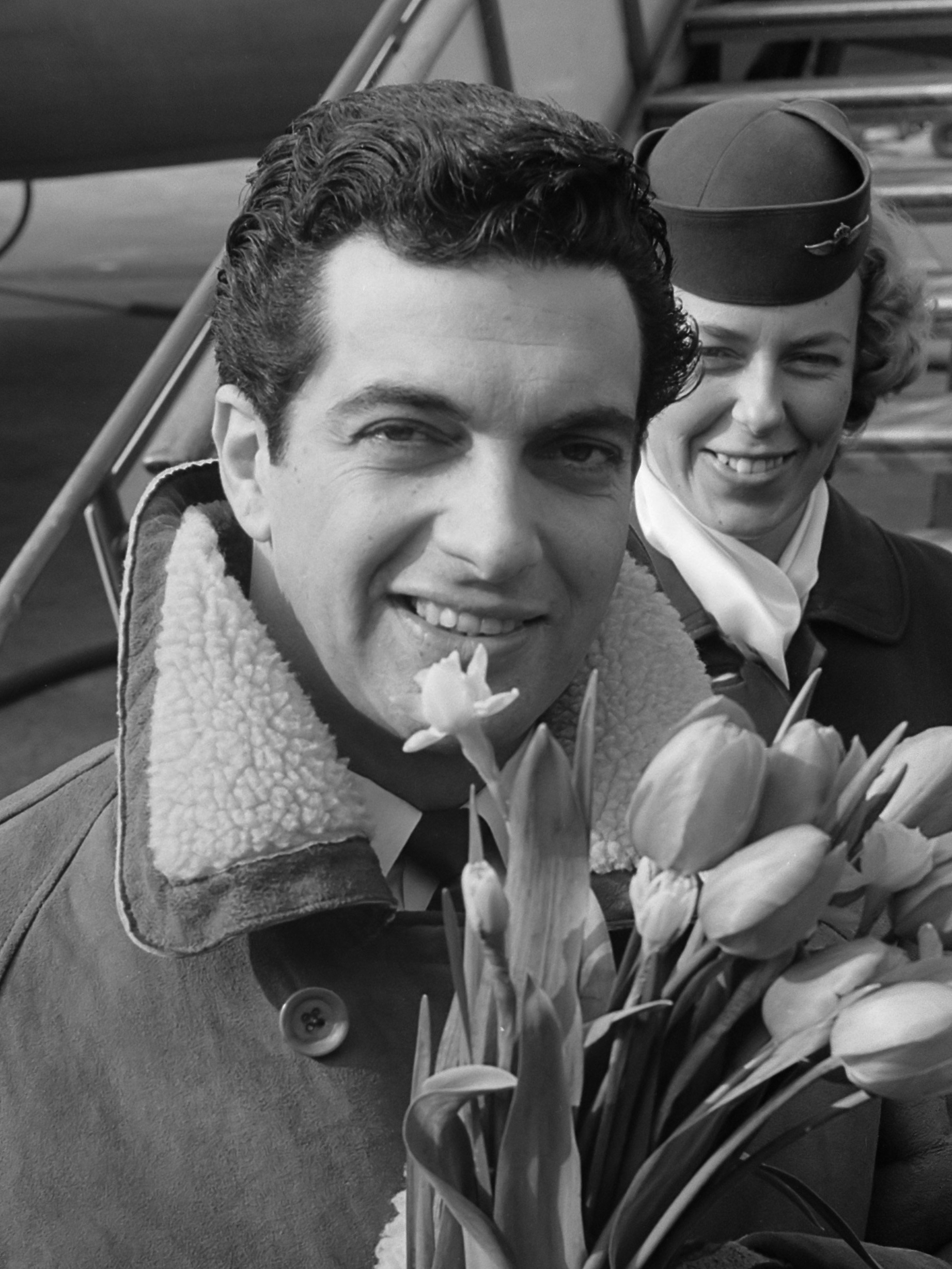 Frankie Vaughan op Schiphol 7 maart 1962